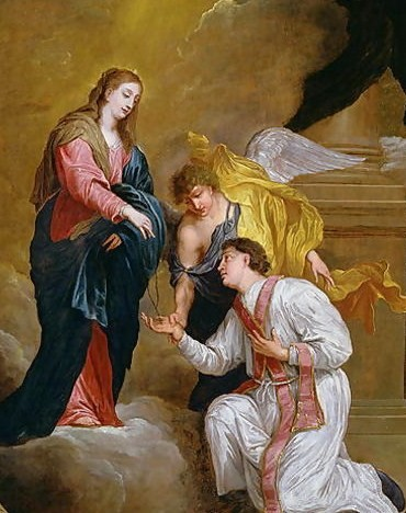 Saint Valentine kneeling